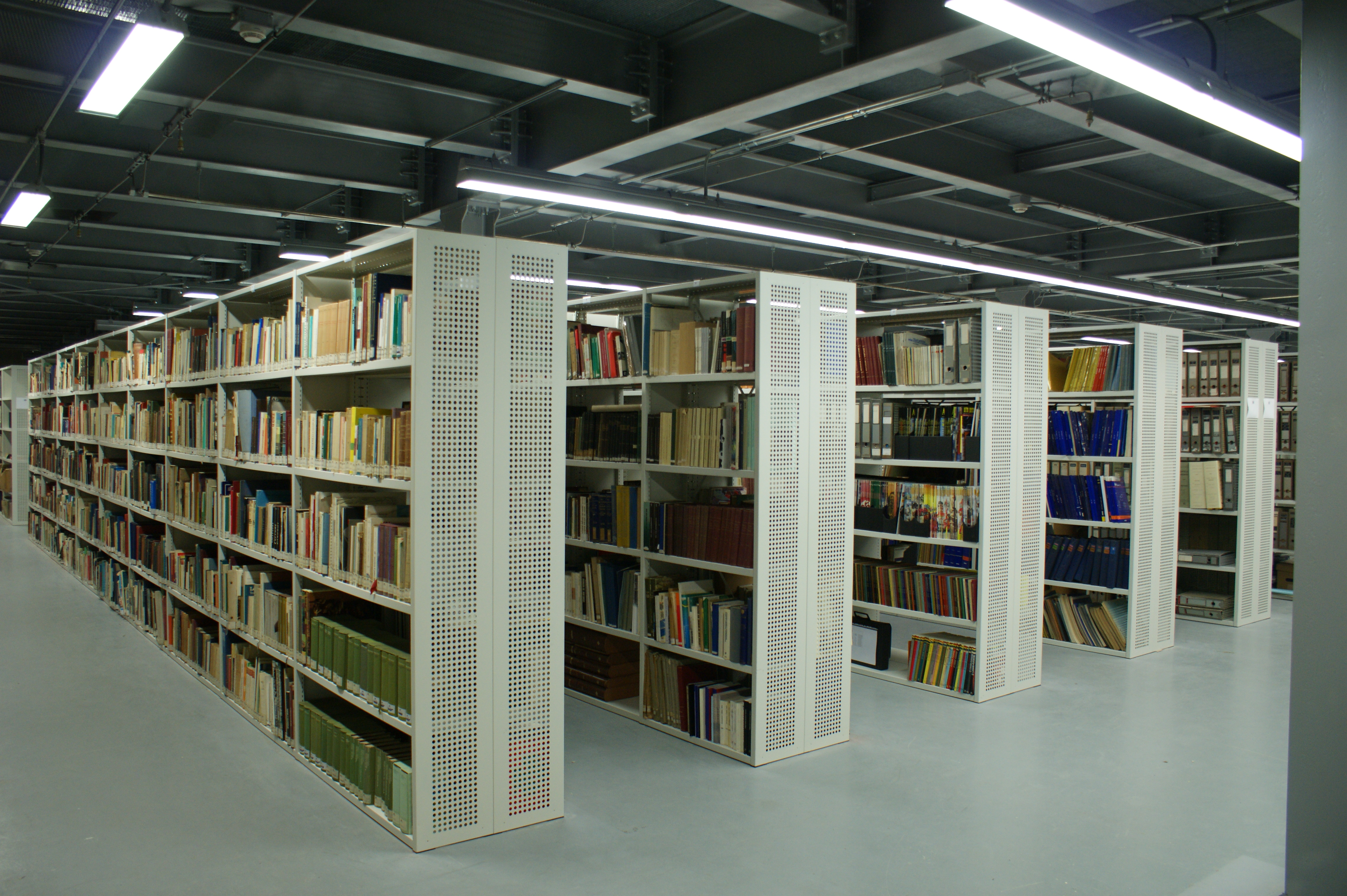 Centro Storico Fiat. Area Archivi